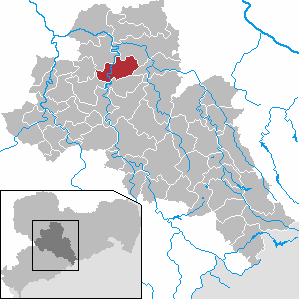 Waldheim in Saxony - district Mittelsachsen